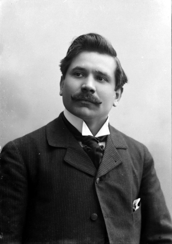 Amedeo Bassi fotografato da Mario Nunes Vais